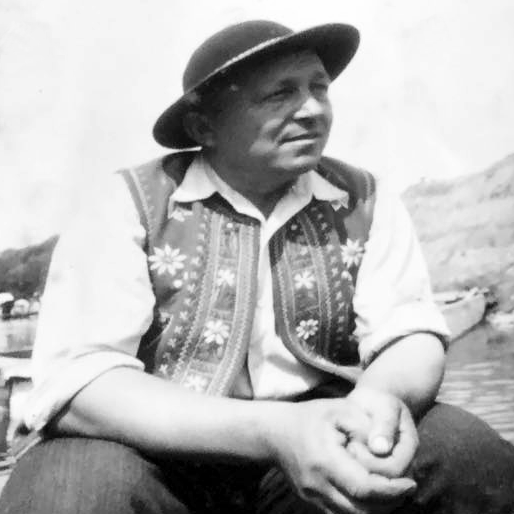 Franciszek Koterba